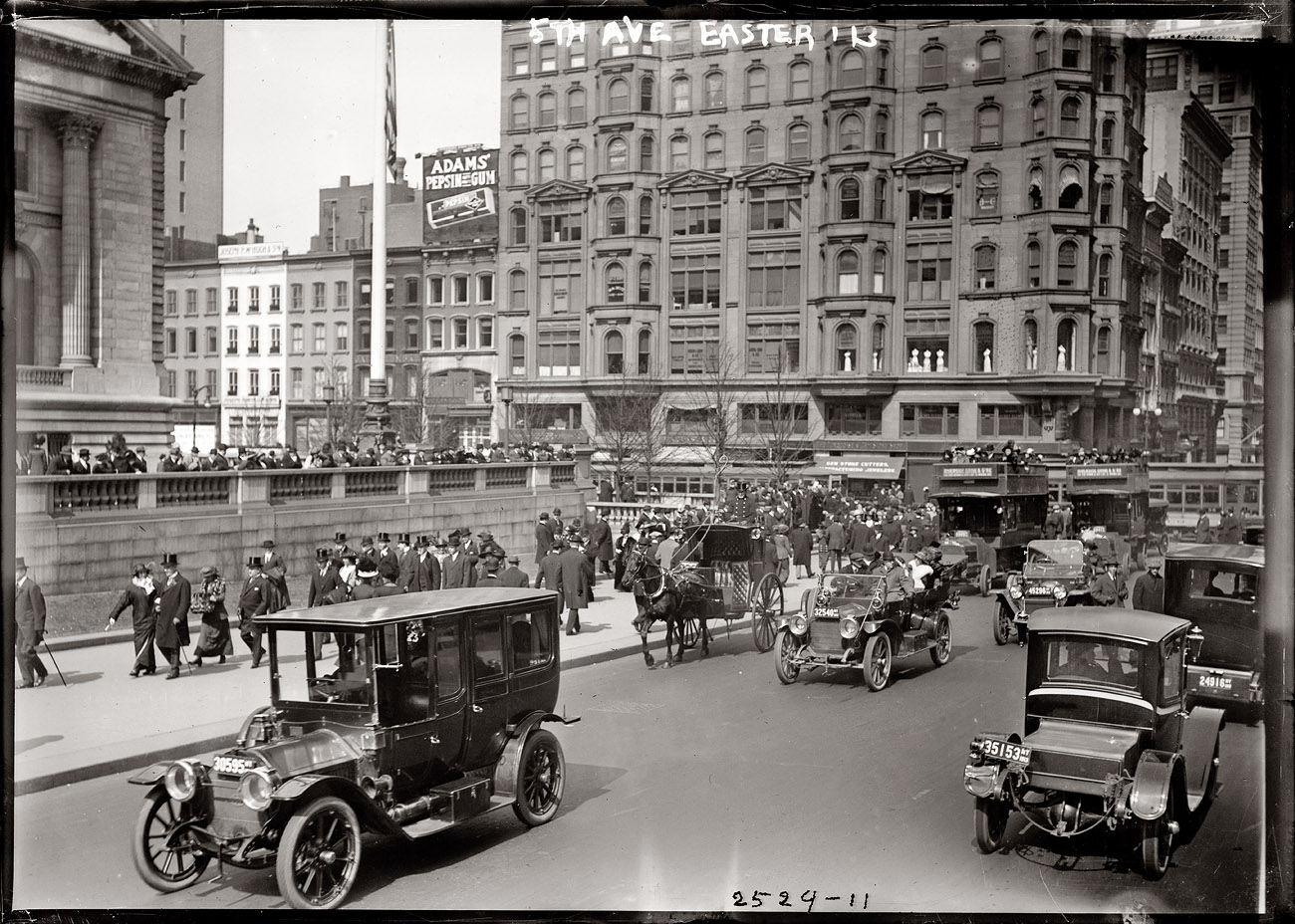 Пятая авеню Нью-Йорка. Слева колоннада Собора святого Патрика.